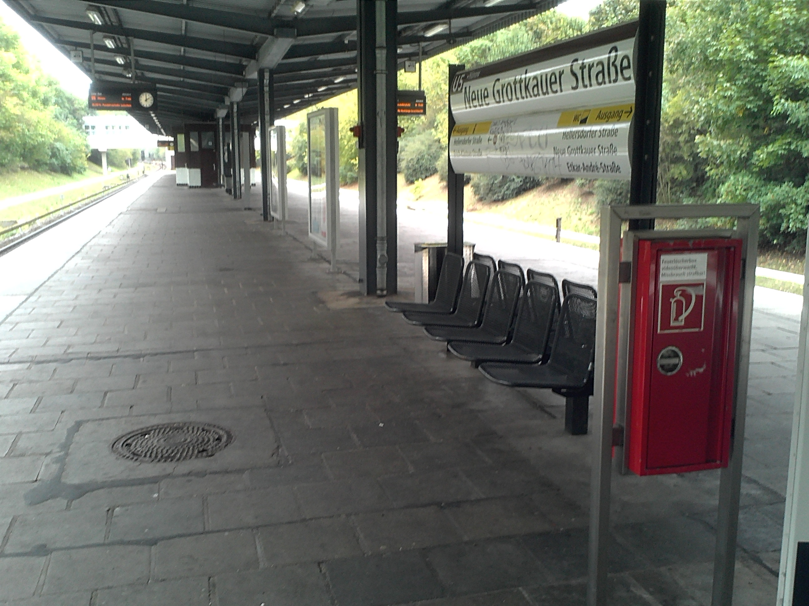 U-Bahnhof Neue Grottkauer Straße (Berlin) nach Abbau der Litfasssäulen